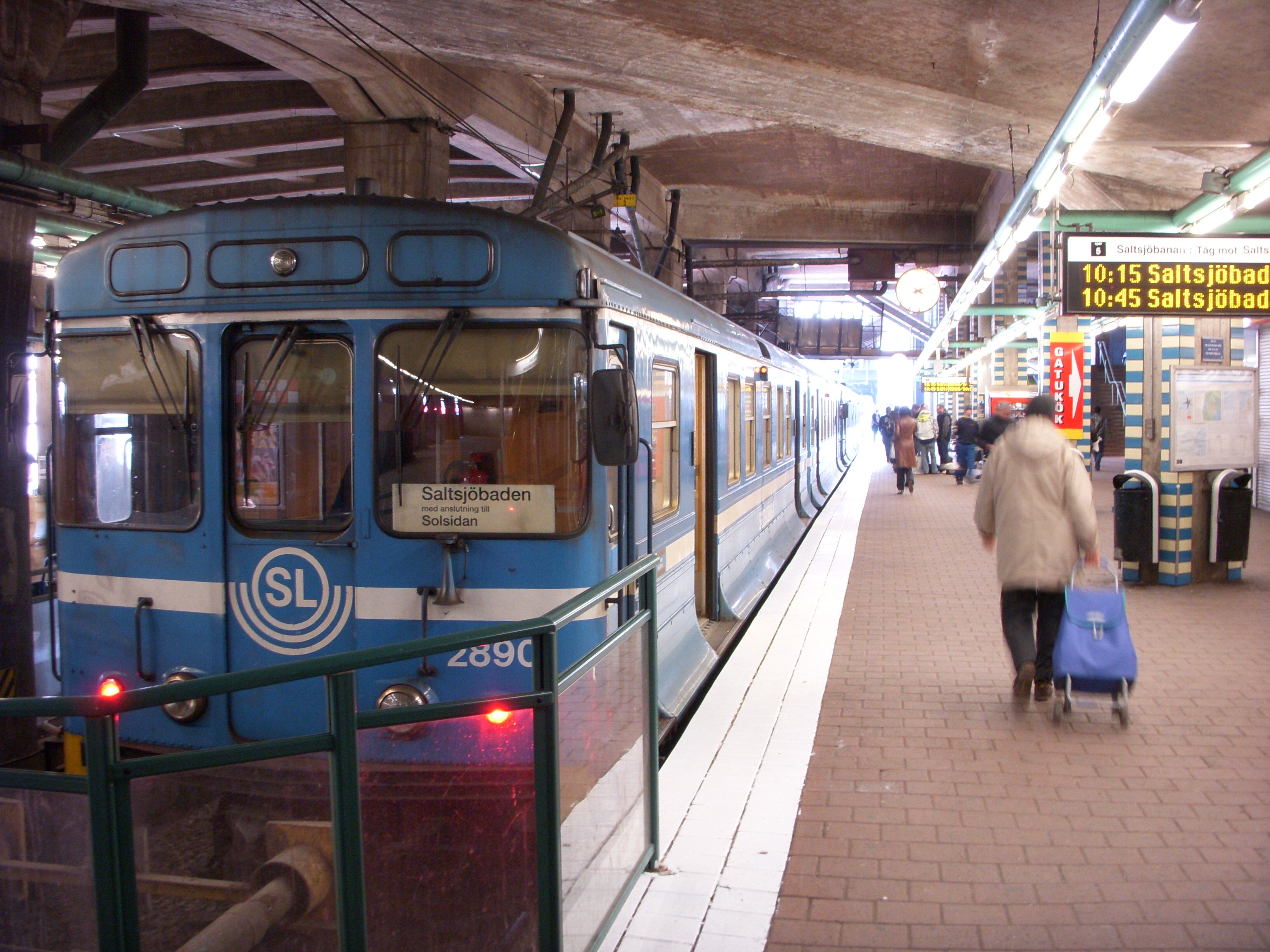 Slussen, Stockholm, inventering april 2009